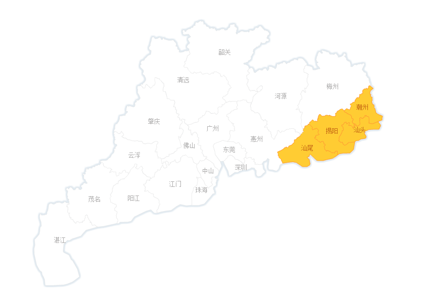 中文（中国大陆）: 粤东地理位置